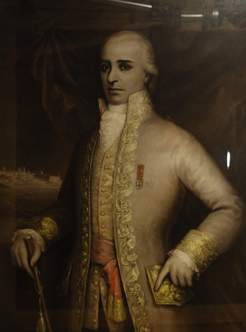 Retrato del Virrey Santiago de Liniers. Fotografía iluminada al pastel.